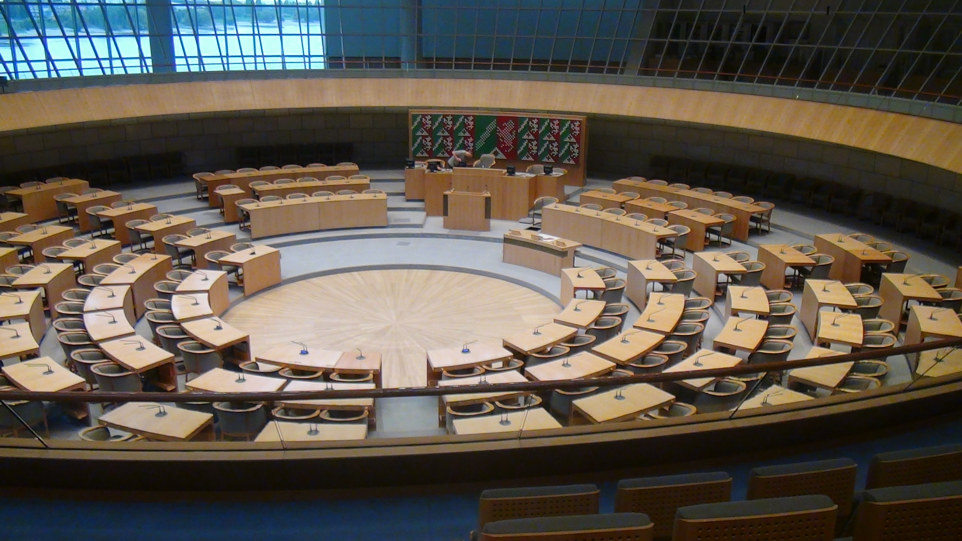 NRW Landtag - Plenarsaal